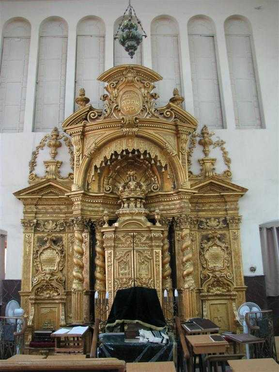 ארון הקודש בישיבת פוניבז'